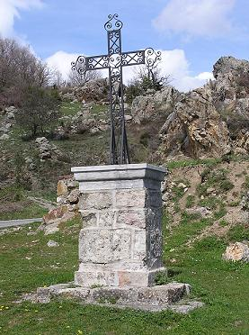 Saint-Roman-de-Codières (le clocher du temple protestant)